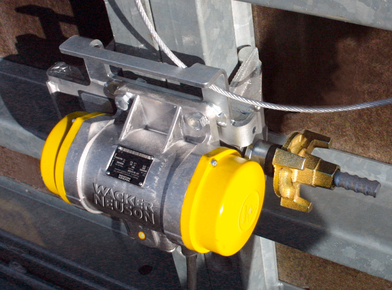 Außenrüttler (Wacker Neuson), an Schalungswand montiert